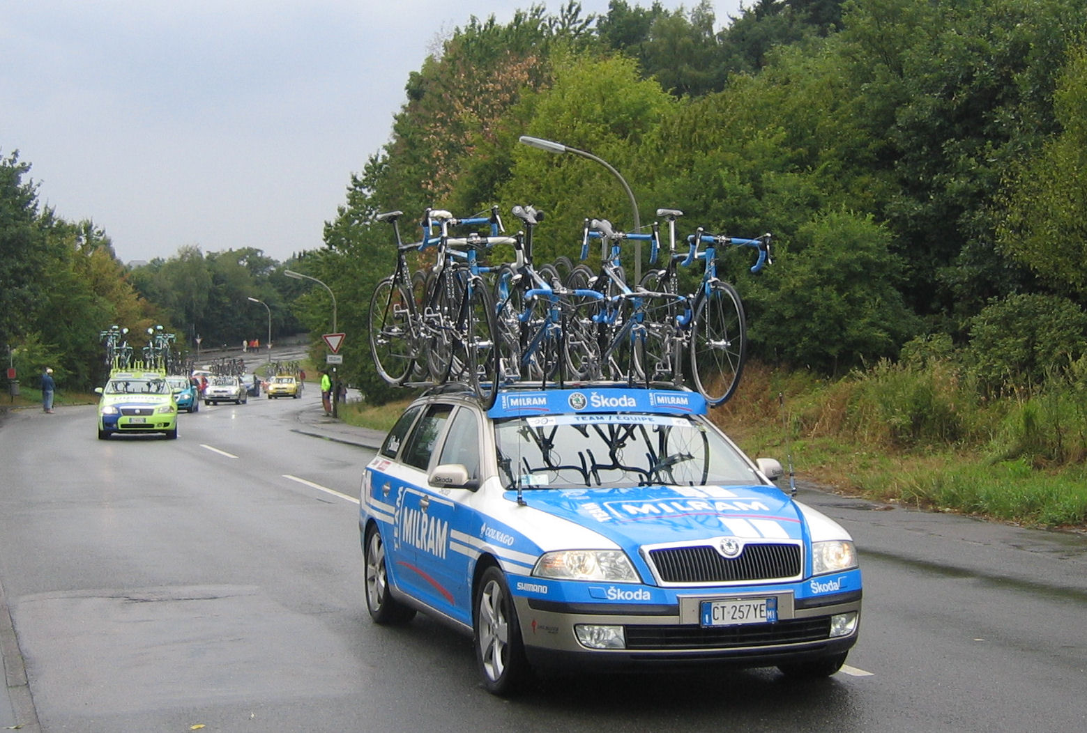 Begleitfahrzeug Milram Deutschlandtour 2006, 1. Etappe